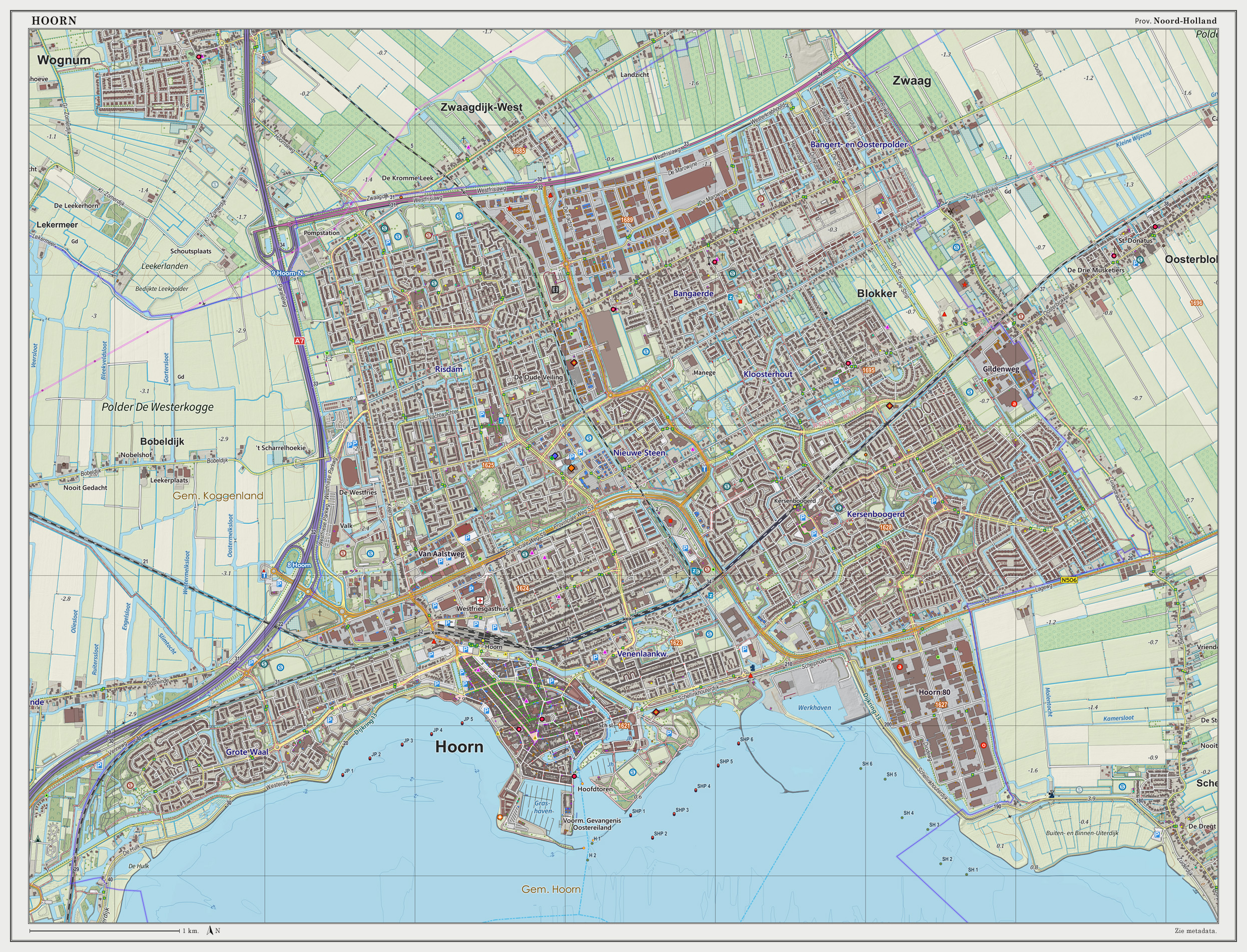 Topografische kaart van Hoorn (woonplaats). Resolutie: 300 pixels/km. Kaartbeeld samengesteld uit de open geodata van de Top10NL en Top25namen (Basisregistratie Topografie, Kadaster), Creative Commons BY licentie. Gebouwvlakken uit open geodata BAG extract. Wegen uit de OpenStreetMap. Reliëfschaduw uit de Actuele Hoogtekaart AHN2. Samenstelling en kleurenschema: Jan-Willem van Aalst, met QGIS2. Zie ook de Legenda.